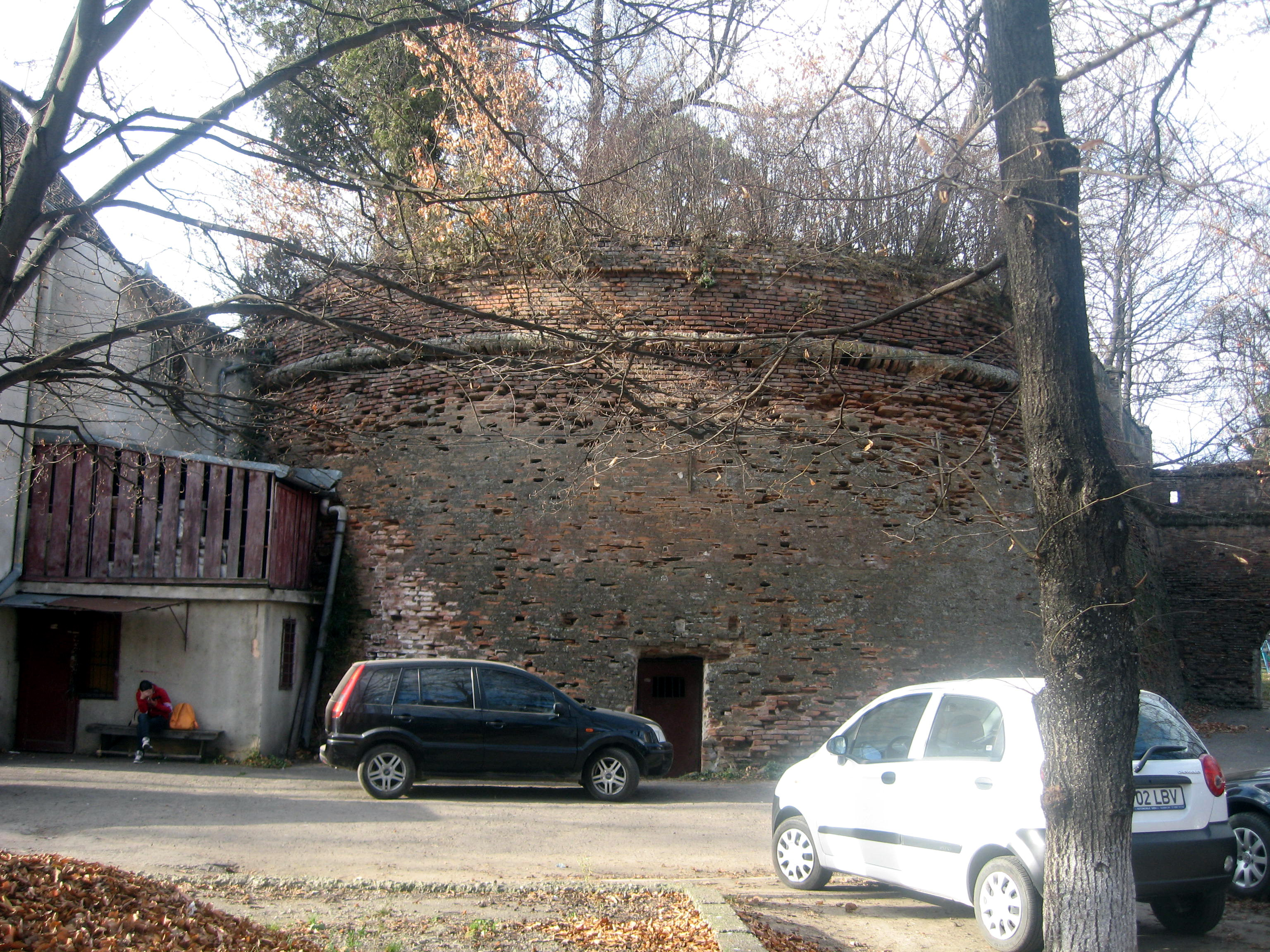 Bastionul Soldisch 05